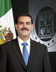 Fotografía oficial del Gobernador del Estado de Sonora